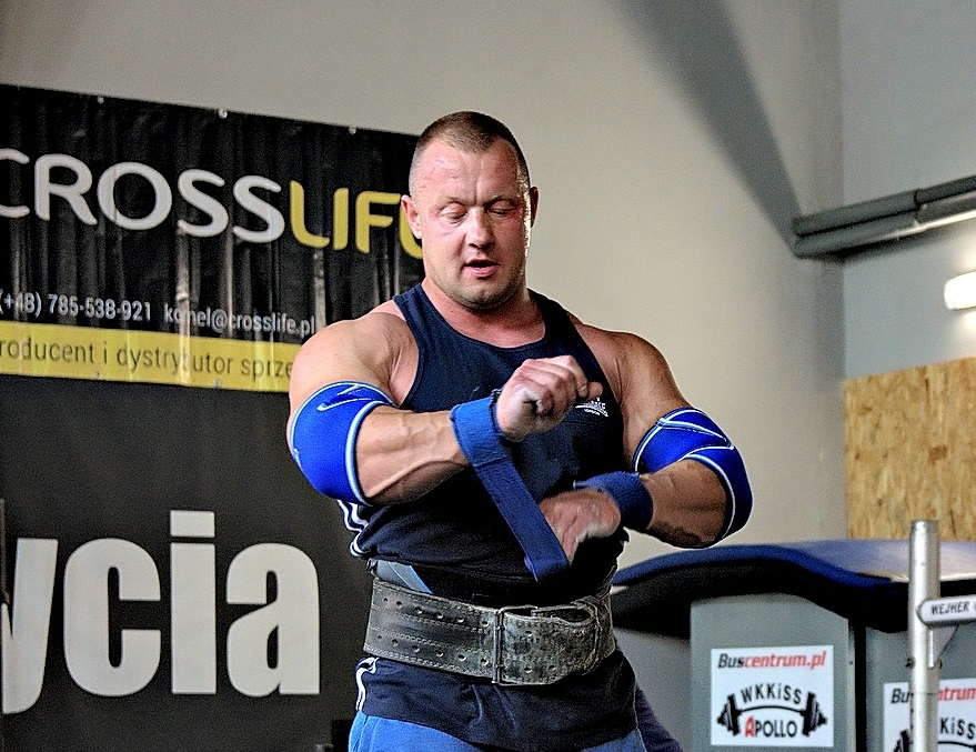 Krzysztof Kacnerski, 2018